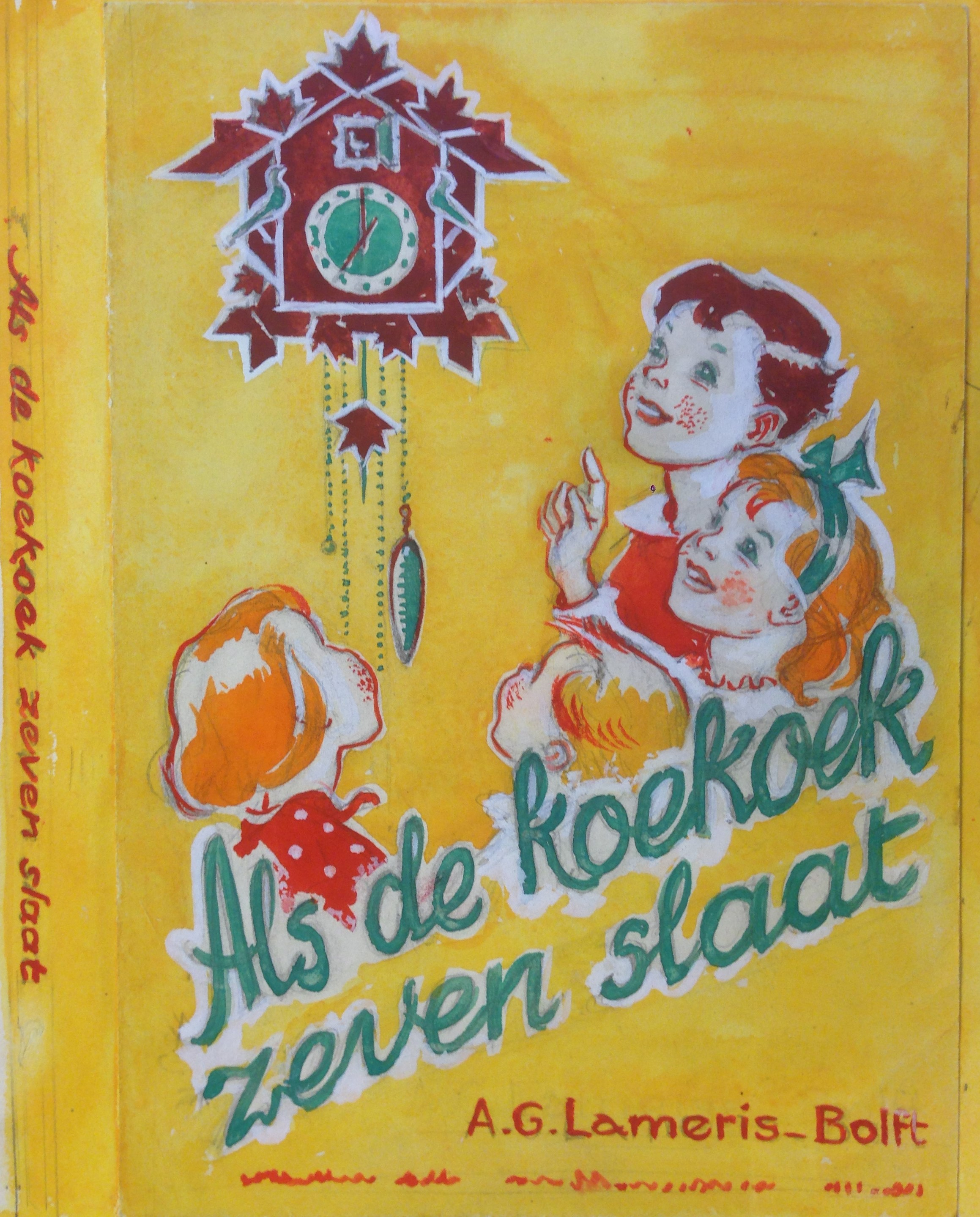 Illustratie uit een bepaalde periode